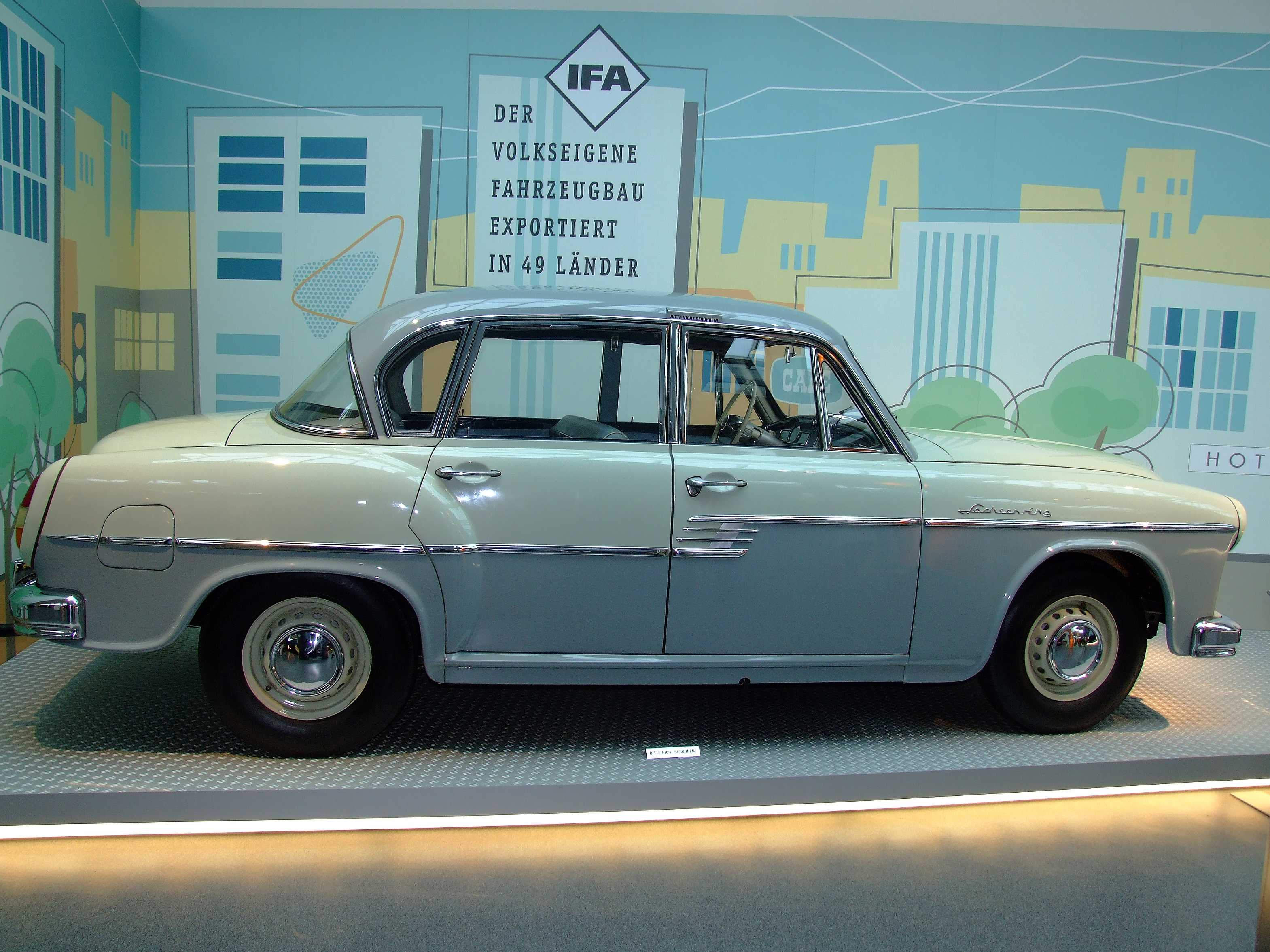 der DDR-Opel Kapitän